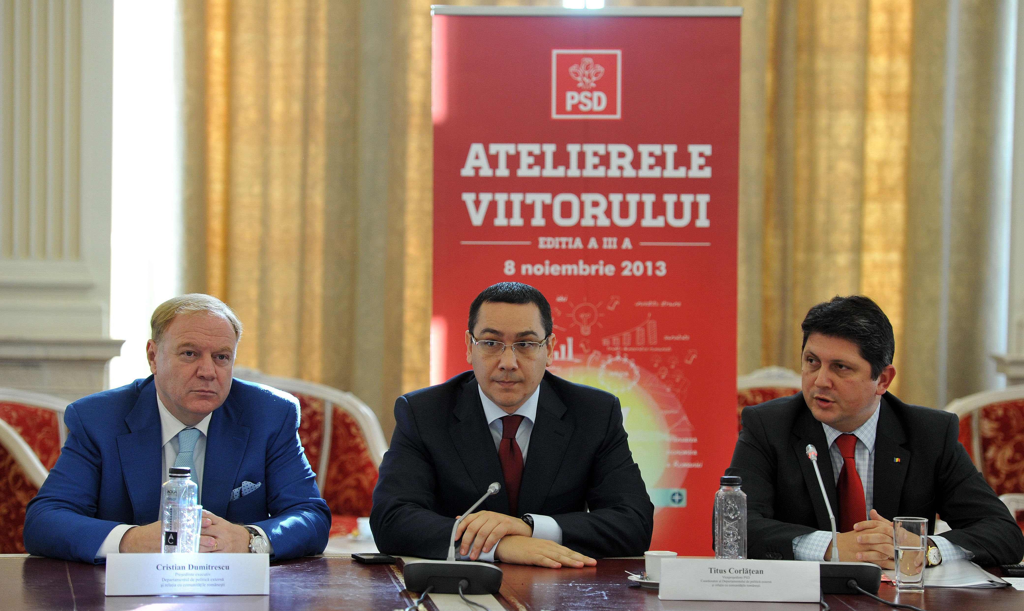 Victor Ponta Victor Ponta, Cristian Dumitrescu si Titus Corlatean la Atelierele Viitorului - Editia a III-a, Palatul Parlamentului